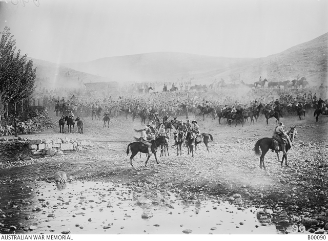 חיילים טורקים שנישבו ע"י חיילי הבריגדה ה-2